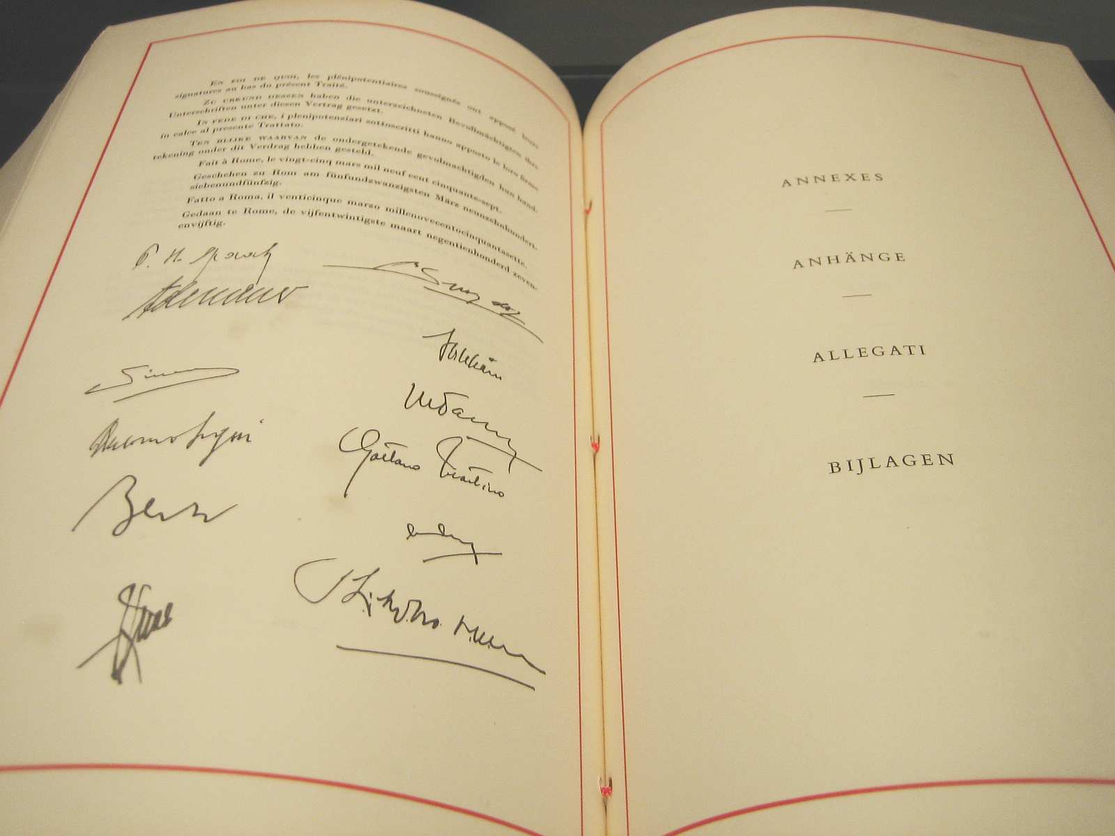 D'Säit mat den Ënnerschrëfte vum Traité iwwert d'Grënne vun der Europäescher Wirtschaftsgemeinschaft ("EWG-Vertrag"). Et ass dëst d'Original, dat d'Belsch kritt huet.